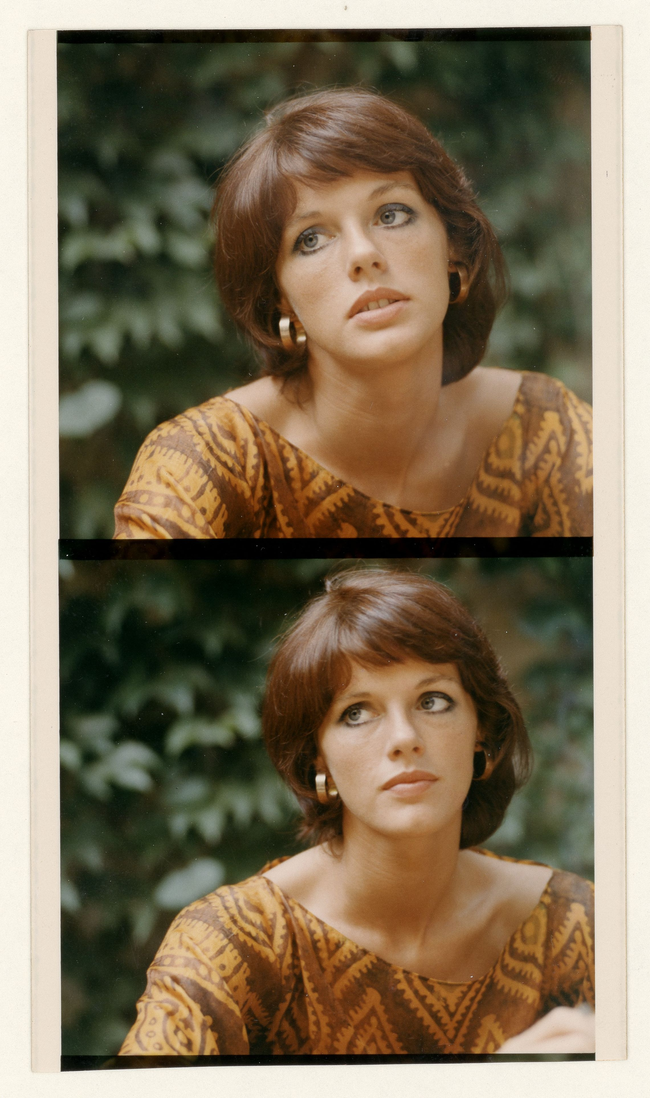 Anny Duperey. Portrait par Fernand Michaud. Festival d'Avignon 1971. Titre : [Recueil. Photographies. Portraits d'Anny Duperey. Festival d'Avignon. 1971 / Fernand Michaud] Auteur : Michaud, Fernand (1929-2012). Photographe Date d'édition : 1971 Sujet : Duperey, Anny (1947-....) -- Photographies Sujet : Duperey, Anny (1947-....) -- Portraits Sujet : Festival d'Avignon (25 ; 1971) Type : image fixe Type : photographie Langue : Sans contenu linguistique Format : Rec. factice : coul. ; 8 x 7,5 cm Format : image/jpeg Format : Nombre total de vues : 16 Droits : domaine public Identifiant : ark:/12148/btv1b53126666m Source : Bibliothèque nationale de France, département Arts du spectacle, 4-PHO-3 (10) Relation : Provenance : Bibliothèque nationale de France Date de mise en ligne : 19/09/2016